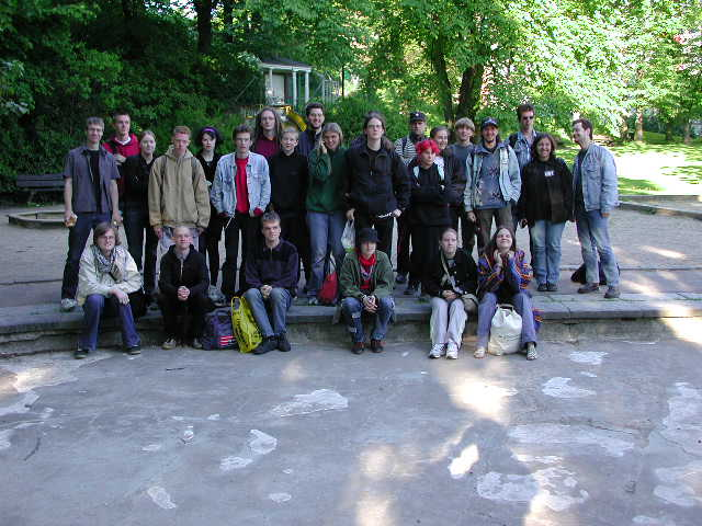 110_internationella_ungsyndikalistmotet